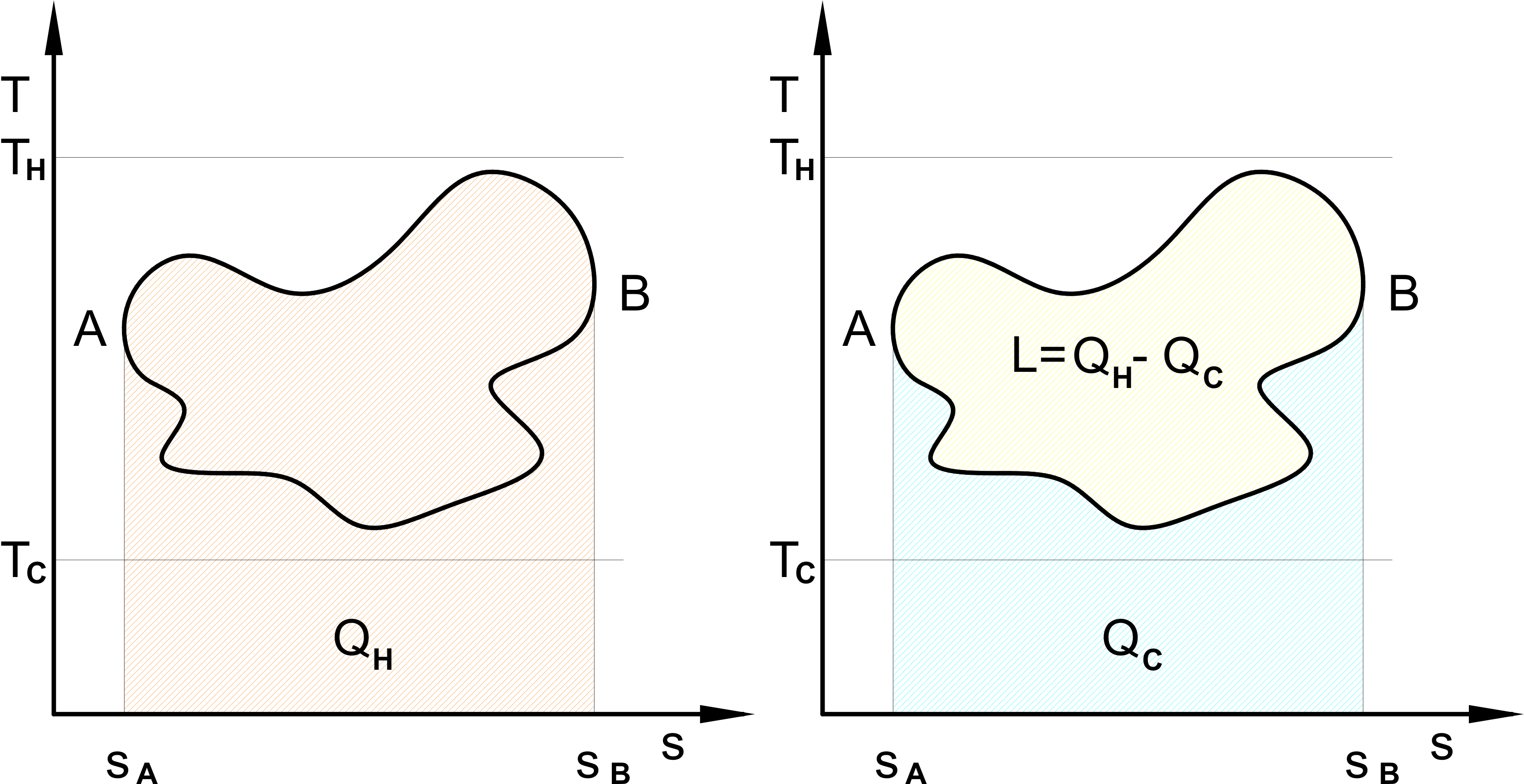 Általános körfolyamat a T-s diagramban